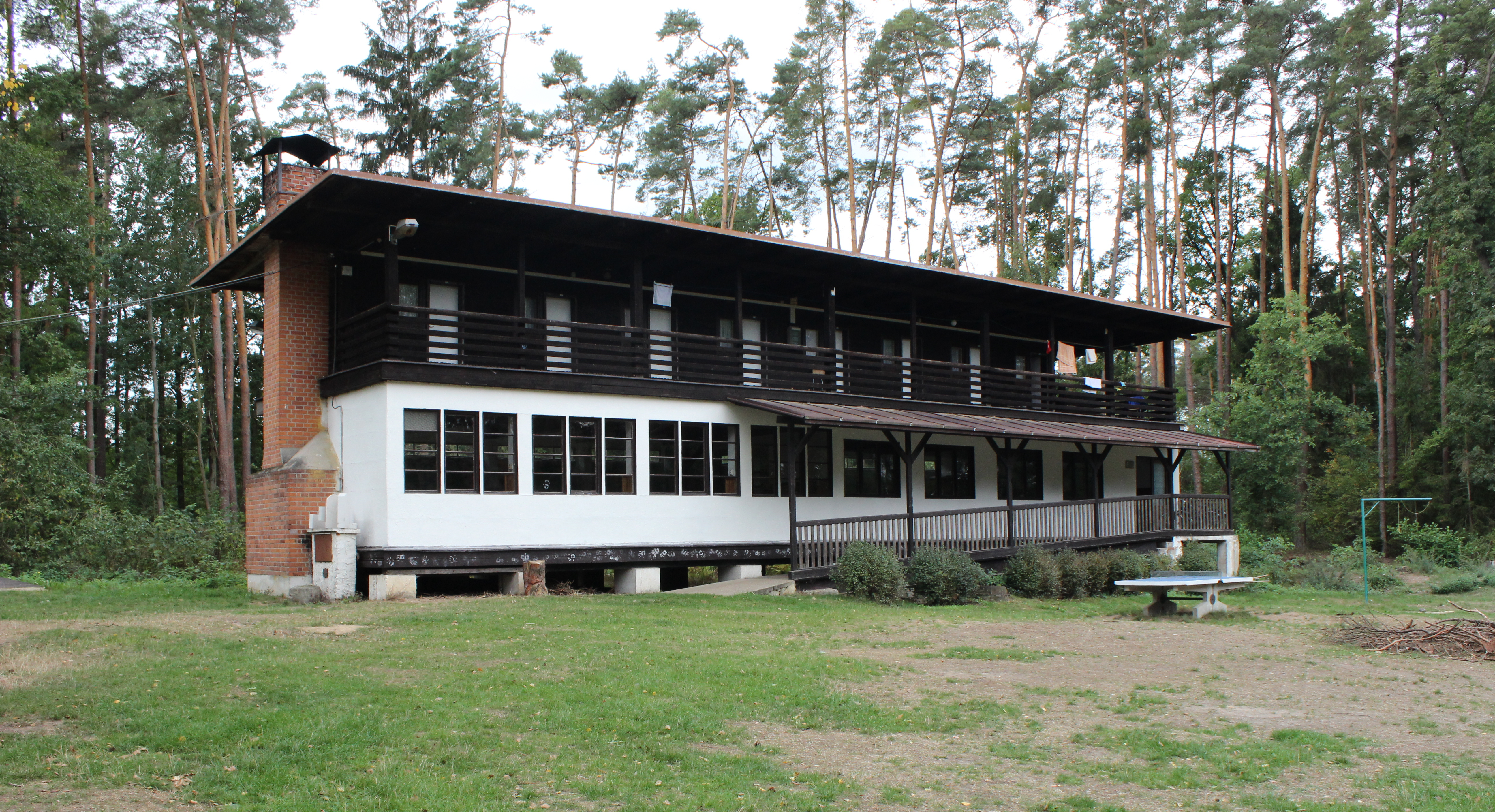 Objekt Sedmík v Táboře Jana Amose Komenského v Bělči nad Orlicí.